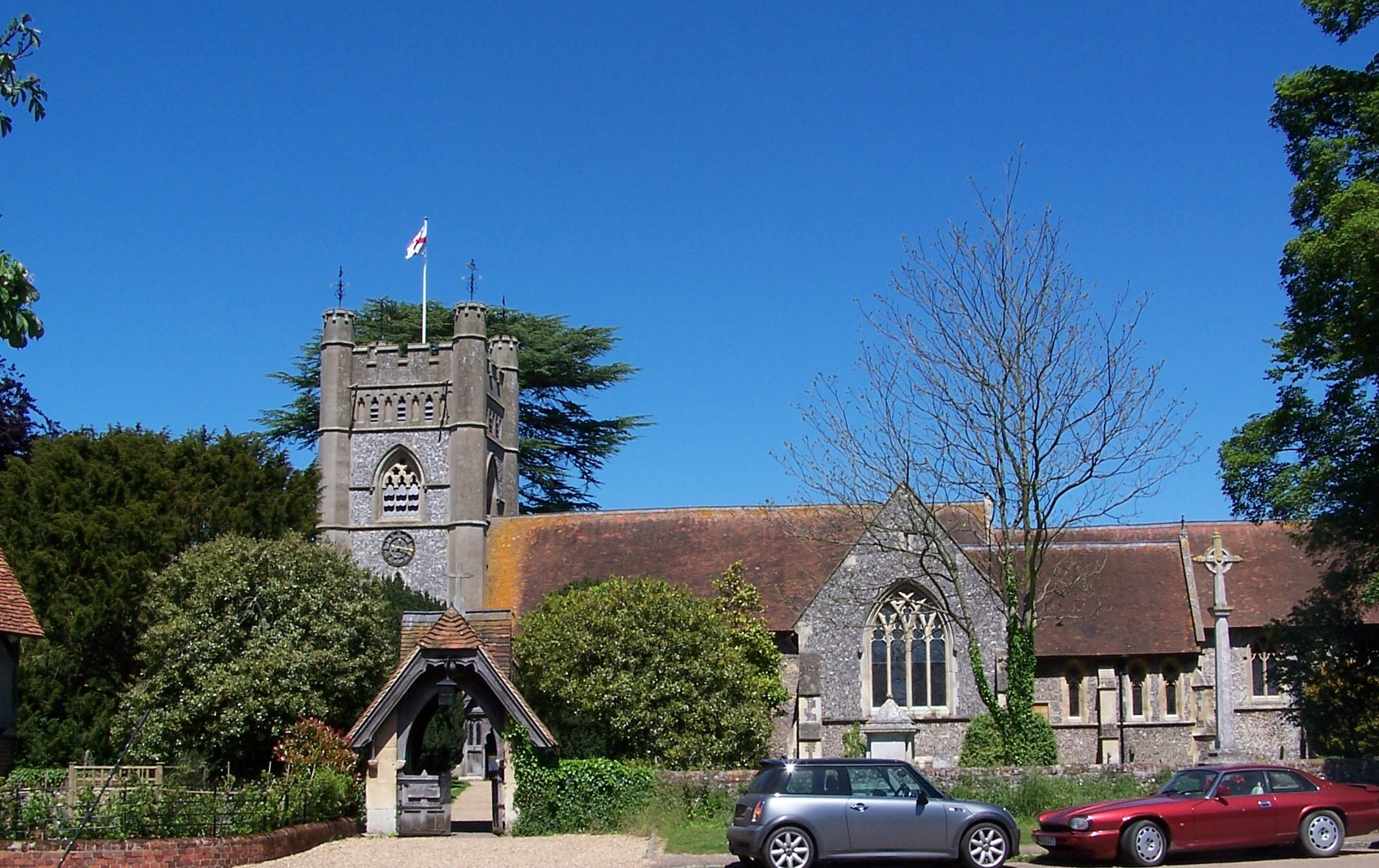 Recadrage de la photo de l'église St Mary the Virgin, à Hambleden, dans le sud du Buckinghamshire, téléversée le 7 juin 2006 par GameKeeper. Au premier plan, à gauche, la porte d'entrée du cimetière (the linch gate).